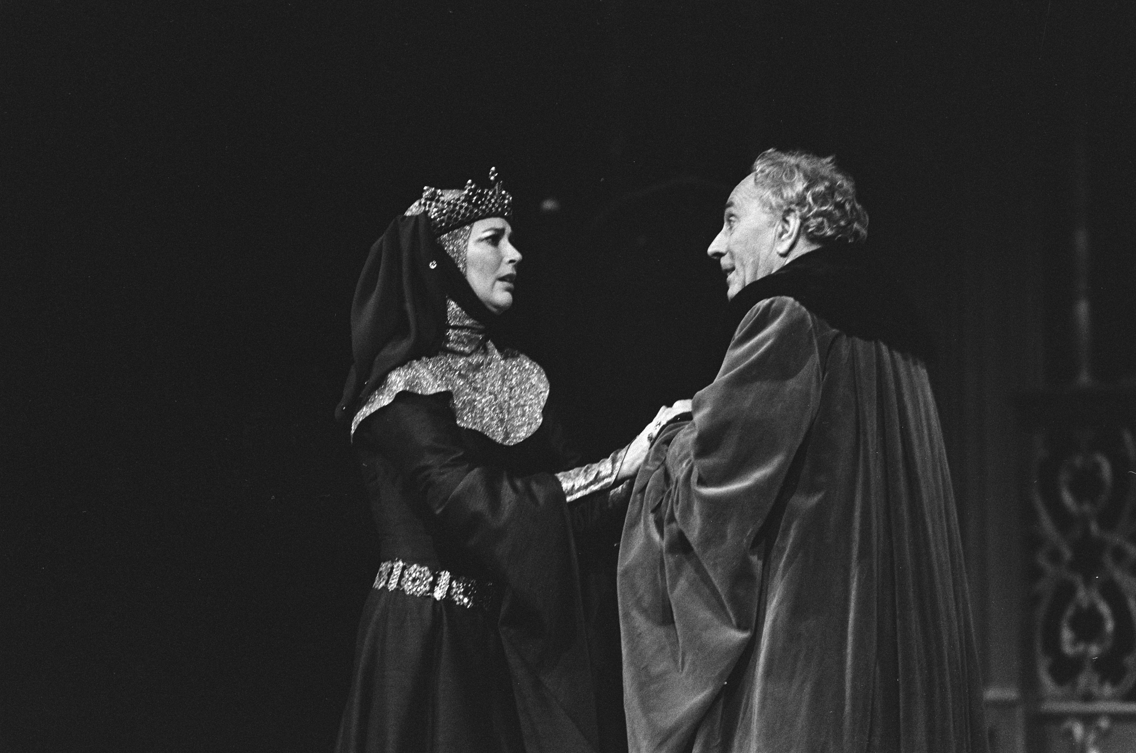 Collectie / Archief : Fotocollectie Anefo Reportage / Serie : [ onbekend ] Beschrijving : Gijsbrecht van Aemstel, treurspel van Vondel, in Stadsschouwburg in Amsterdam. Sigrid Koetse als Badeloch en Johan Schmitz als Gijsbrecht Datum : 31 december 1981 Locatie : Amsterdam, Noord-Holland Trefwoorden : acteurs, toneel Persoonsnaam : Koetse, Sigrid, Schmitz, Johan Fotograaf : Croes, Rob C. / Anefo Auteursrechthebbende : Nationaal Archief Materiaalsoort : Negatief (zwart/wit) Nummer archiefinventaris : bekijk toegang 2.24.01.05 Bestanddeelnummer : 931-8869